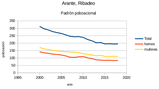 Padrón poboacional. Arante, Ribadeo. Con datos de